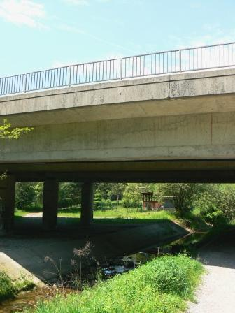 Obvoznica nad Črnušnico.